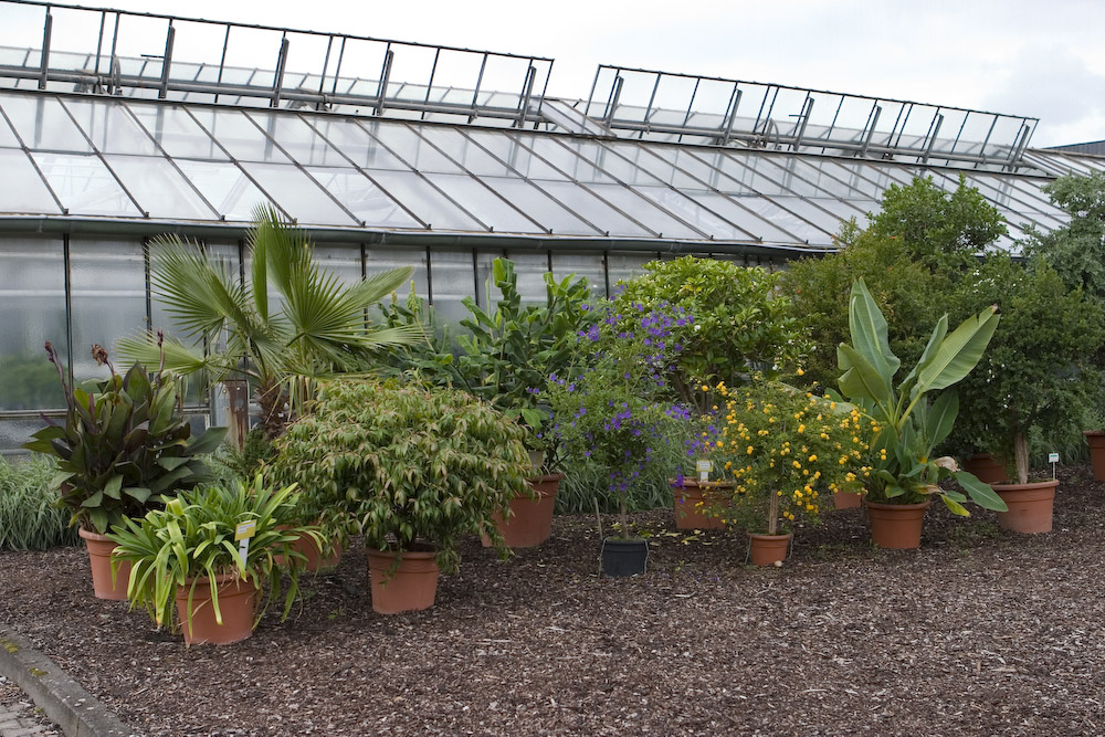 Verschiedene Kübelpflanzen, z.B. Canna, Ficus, Musa, Solanum